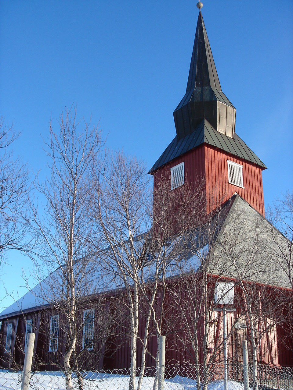 Kautokeino kirke/Kautokeino Church